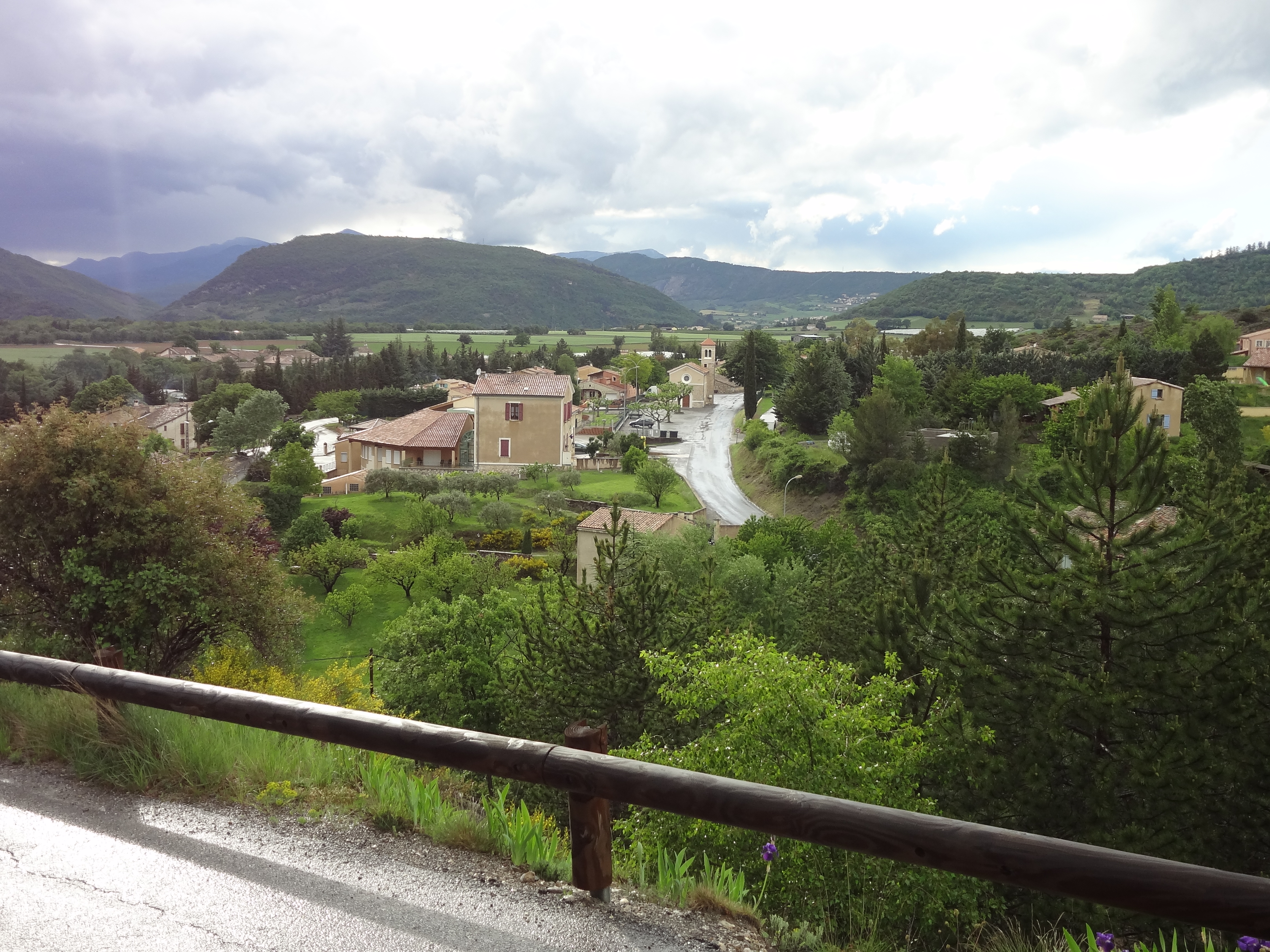 Village de Salignac (Alpes-de-Haute-Provence, France). On voit la mairie (première maison à gauche, sur la place), la place centrale, l’église paroissiale (orientée à l’ouest : le portail fait face au sud-est, direction dans le dos du photographe).